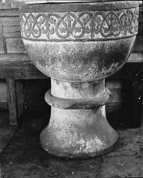 Dopfunt av sten. Kategori: (04) DopfuntarDopfunt av sten.